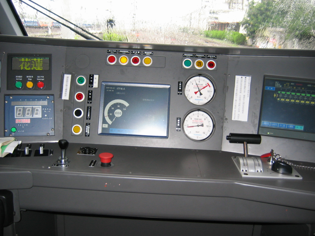 中文（台灣）: 臺灣鐵路管理局TEMU1000型電聯車駕駛座面板。